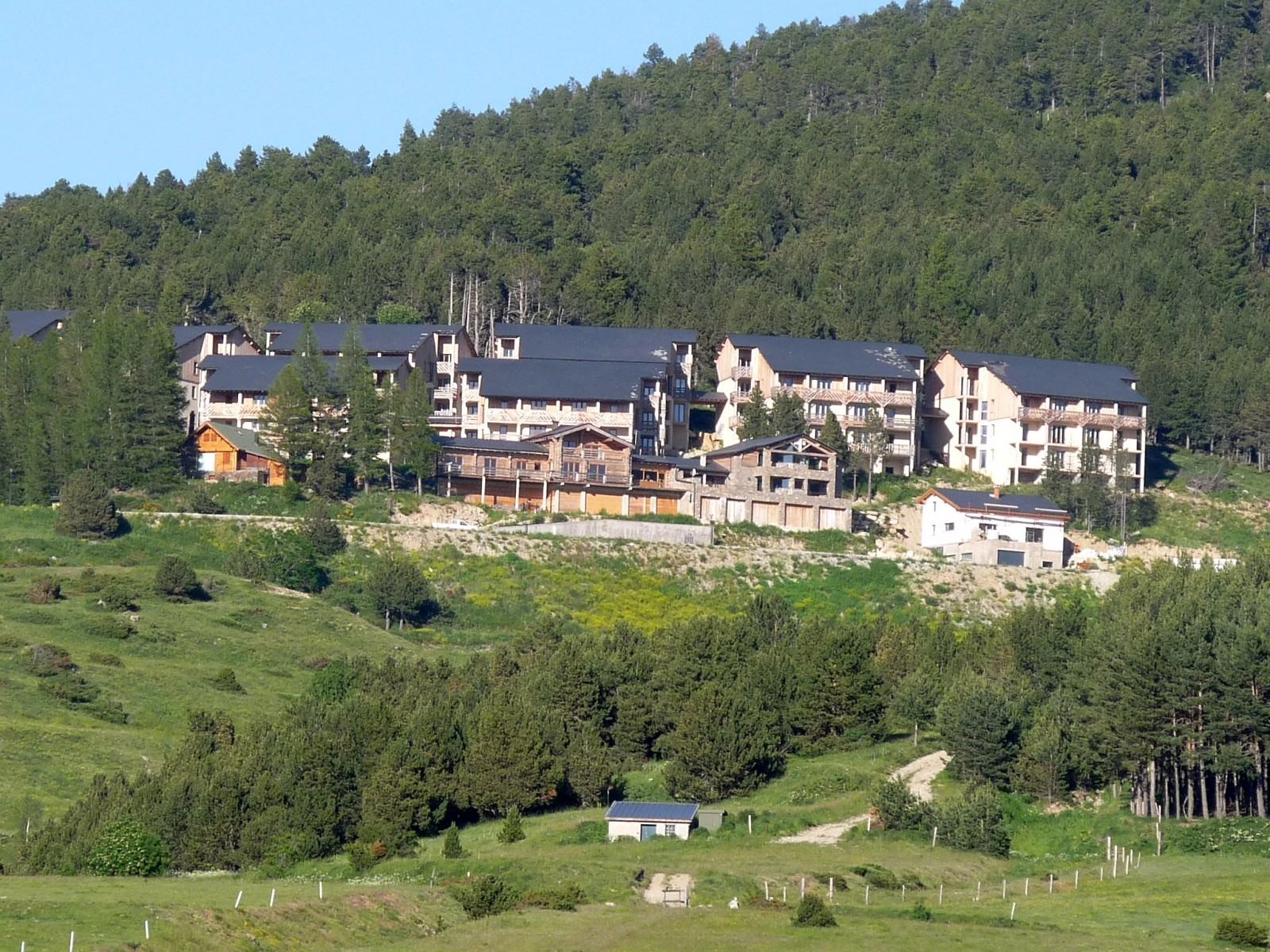 Station de ski Eyne 2600 vu d'Eyne, Pyrénées-Orientales, France